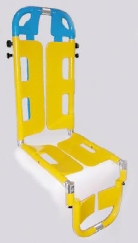 Universal-Rescue-Stretcher (Kombitrage)